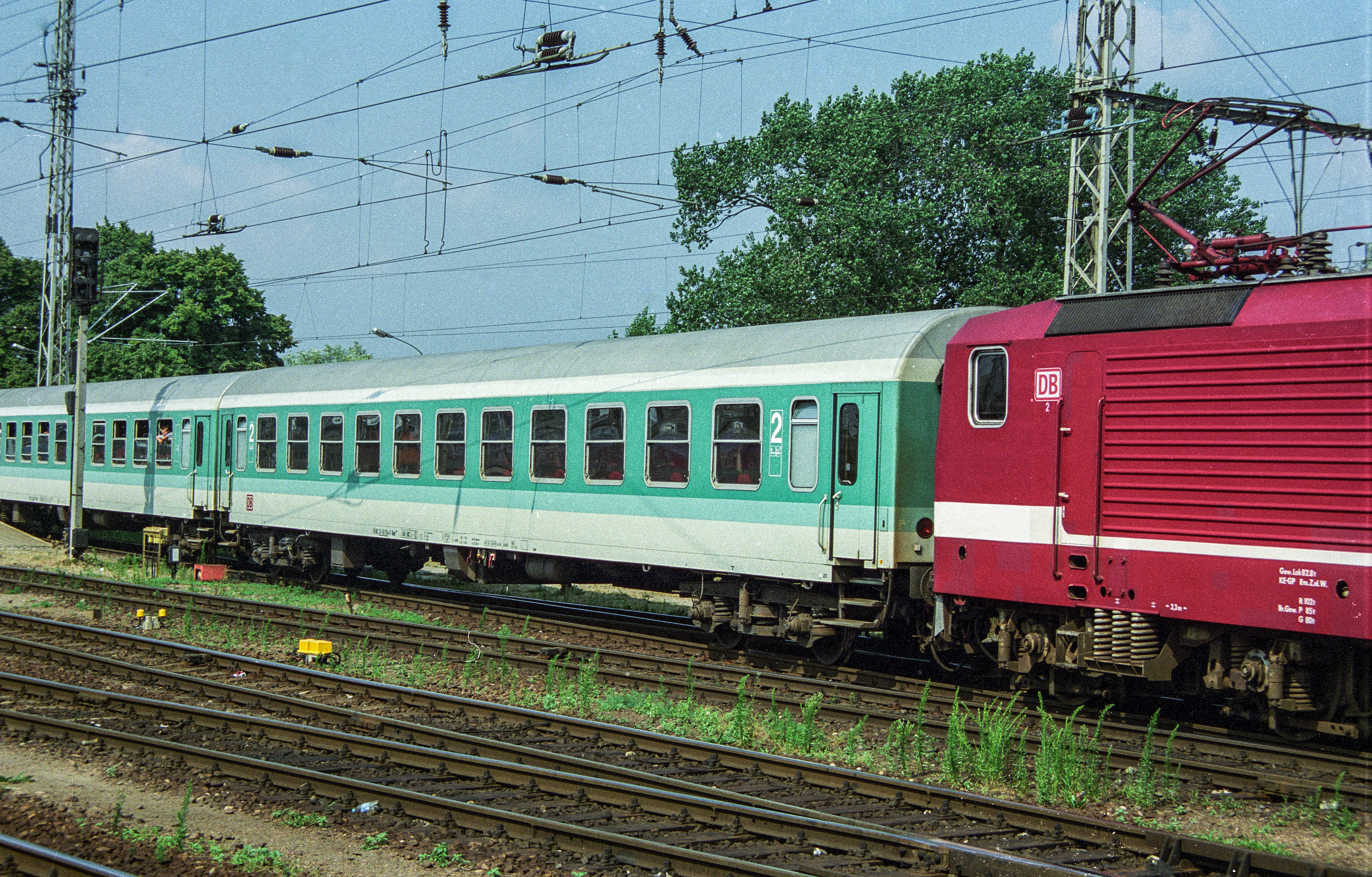 Bom 280.1 51 80 21-50 154-0 RE 3639 Stralsund - Cottbus Stralsund 26-07-1997 T199707-0248